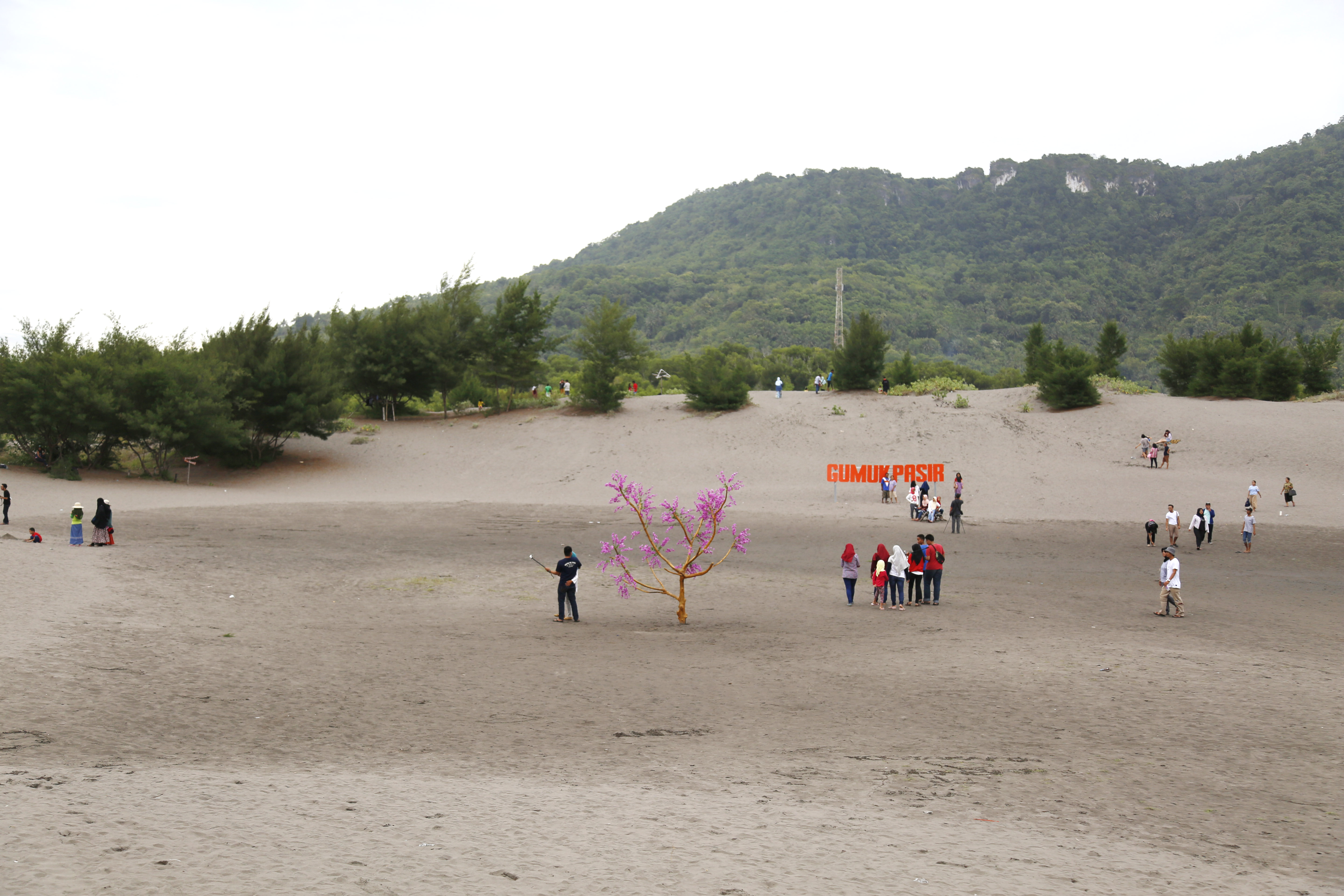 Kawasan dengan lembah pasir yang indah